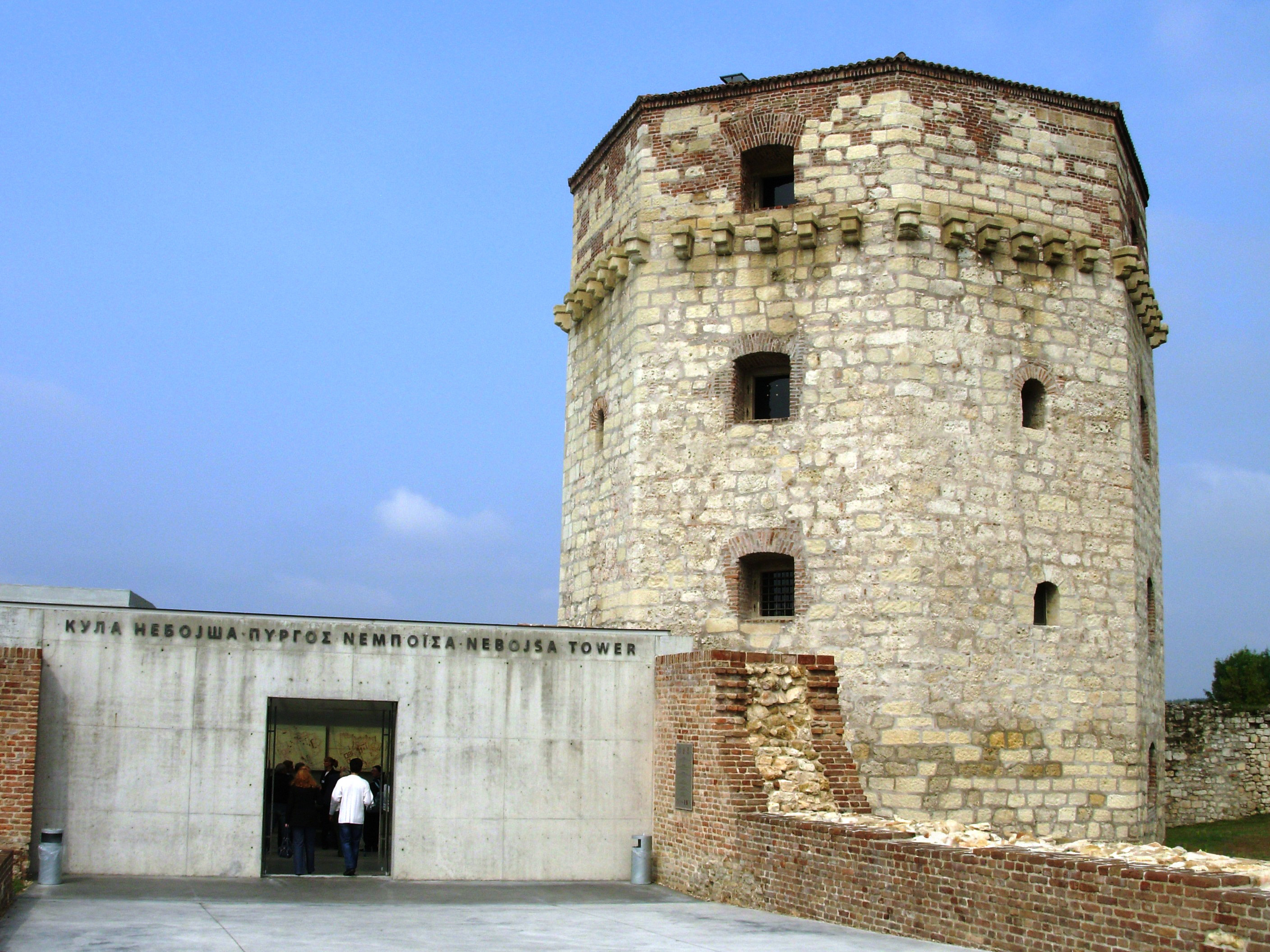 Кула Небојша 2011. Сликао Голдфингер